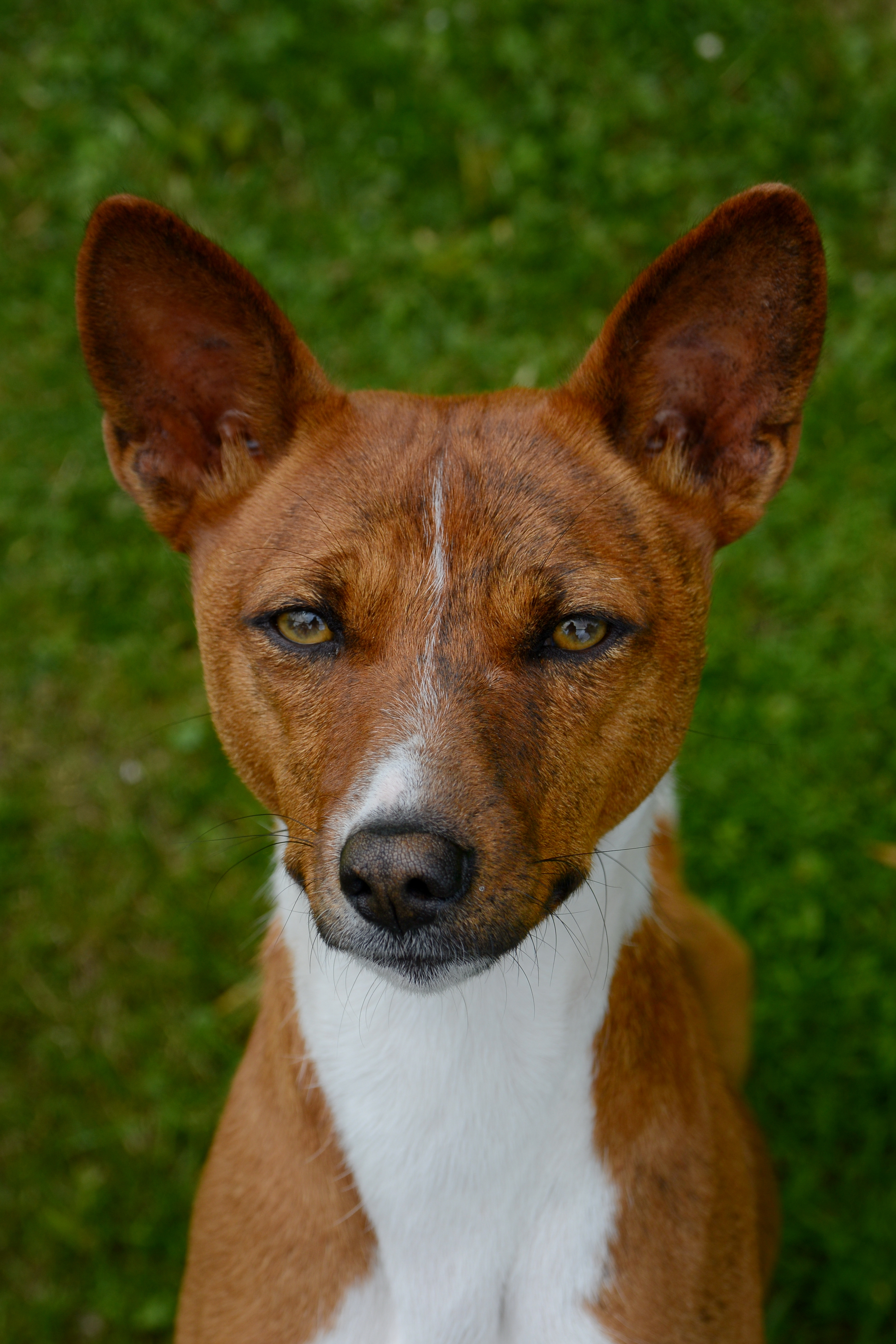 Der Name Basenji bedeutet in der Übersetzung so viel wie „kleines wildes Ding aus dem Busch“, was in der Sprache der Pygmäen wie „Basenschi“ klingt. Der Basenji entstammt dem zentralen Afrika und wurde dort 1870 von den Briten entdeckt. Seit den 1930er Jahren wird er systematisch als Hunderasse gezüchtet. Quelle für die Rassebeschreibung: Artikel Basenji in der Wikipedia; Autoren siehe dort.